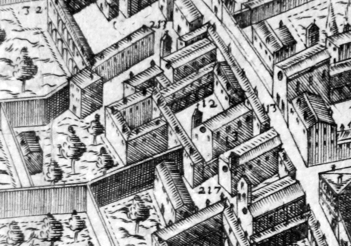 Pianta del buonsignori, dettaglio 013 bonifazio ospedale 2